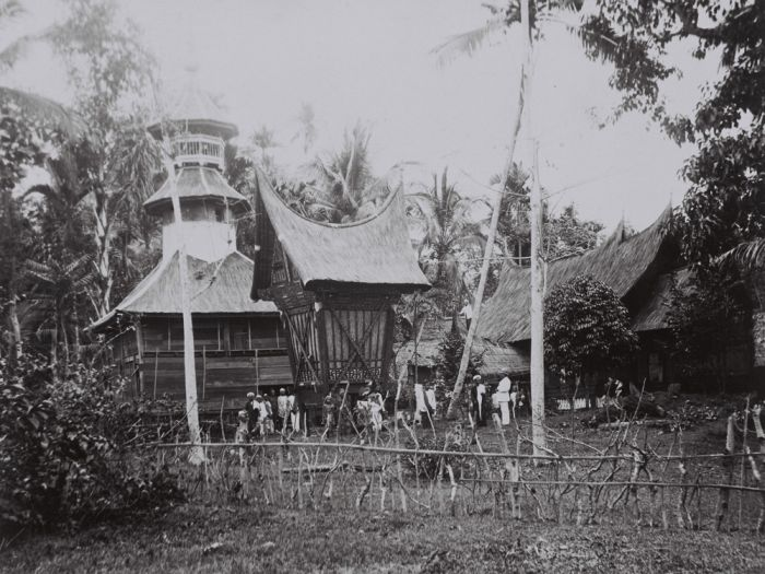 foto. Minangkabau rijstschuur bij een moskee en surau